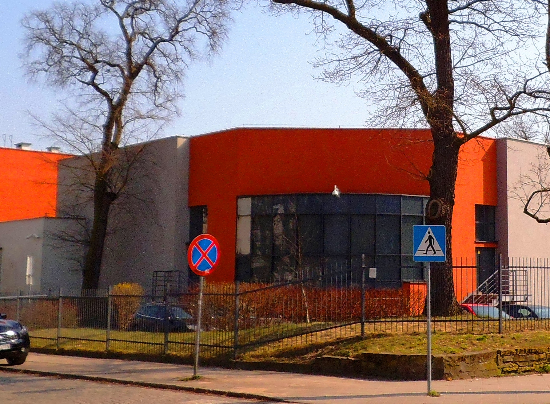 Aula Wydziału Matematyki i Informatyki w Toruniu